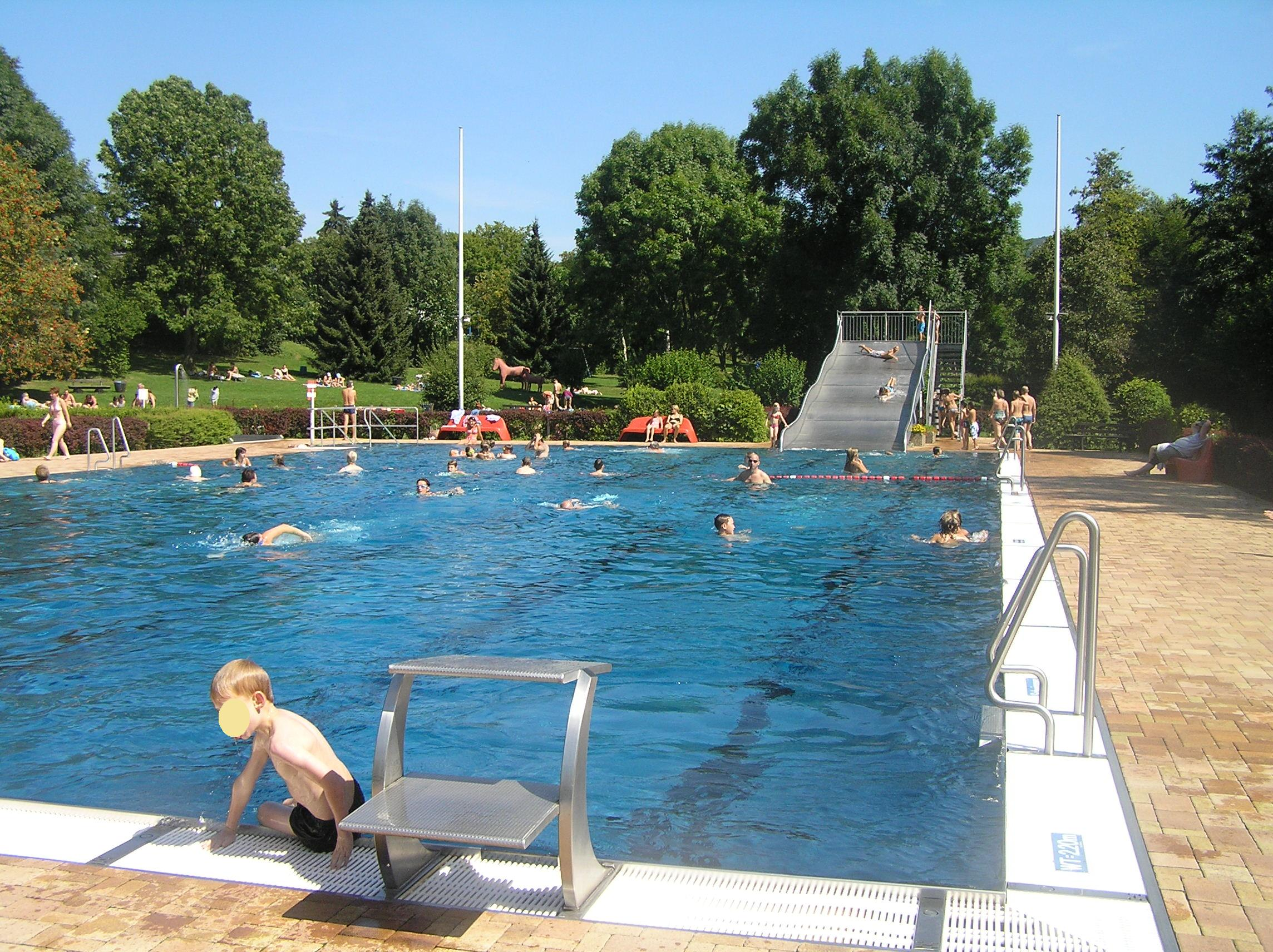 Freibad in Schloßborn. Das Bild zeigt das große Becken mit der Rutsche. Im Hintergrund sind die Liegewiesen und die Kletterpferde zu sehen